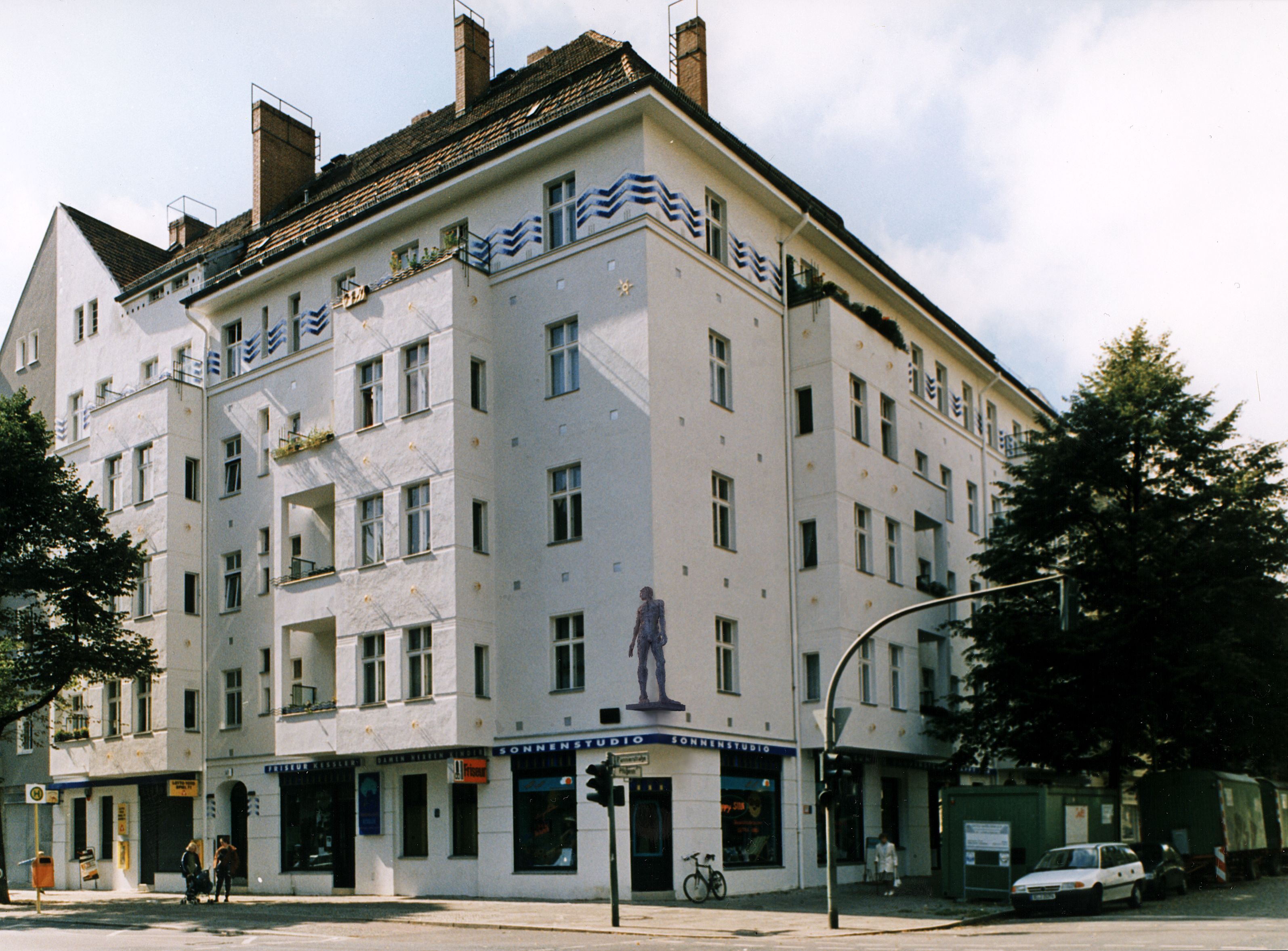 In Zusammenarbeit mit dem Architekten vom Büro Holger Schweitzer